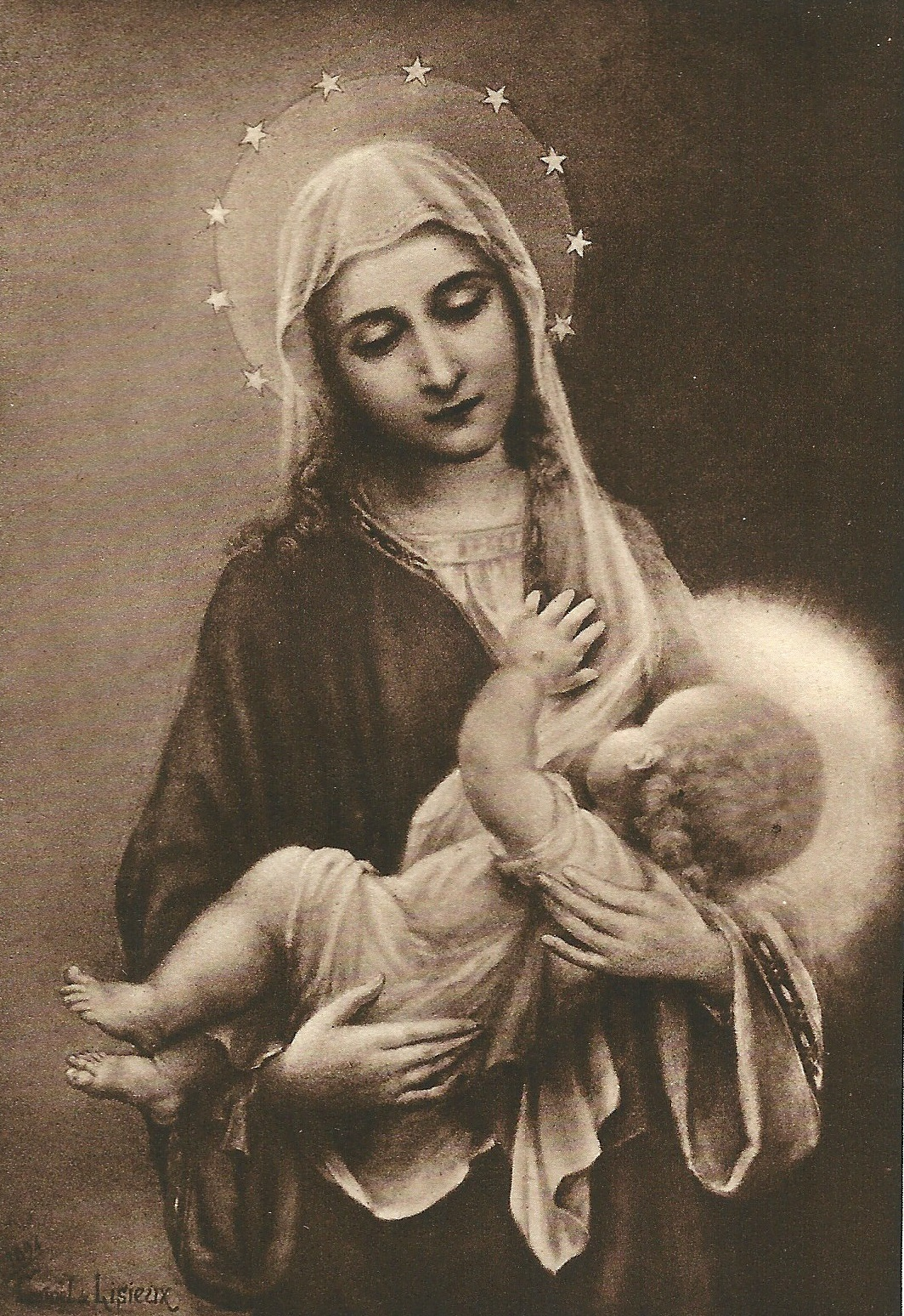 Gravure de "Sainte Thérèse de l'Enfant Jésus, Histoire d'une âme écrite par elle-même, Lisieux, Office central de Lisieux (Calvados), & Bar-le-Duc, Imprimerie Saint-Paul, 1937, édition 1940." La Vierge-Mère, reproduction d'un tableau de Céline, peint en 1894 à la demande de Thérèse.